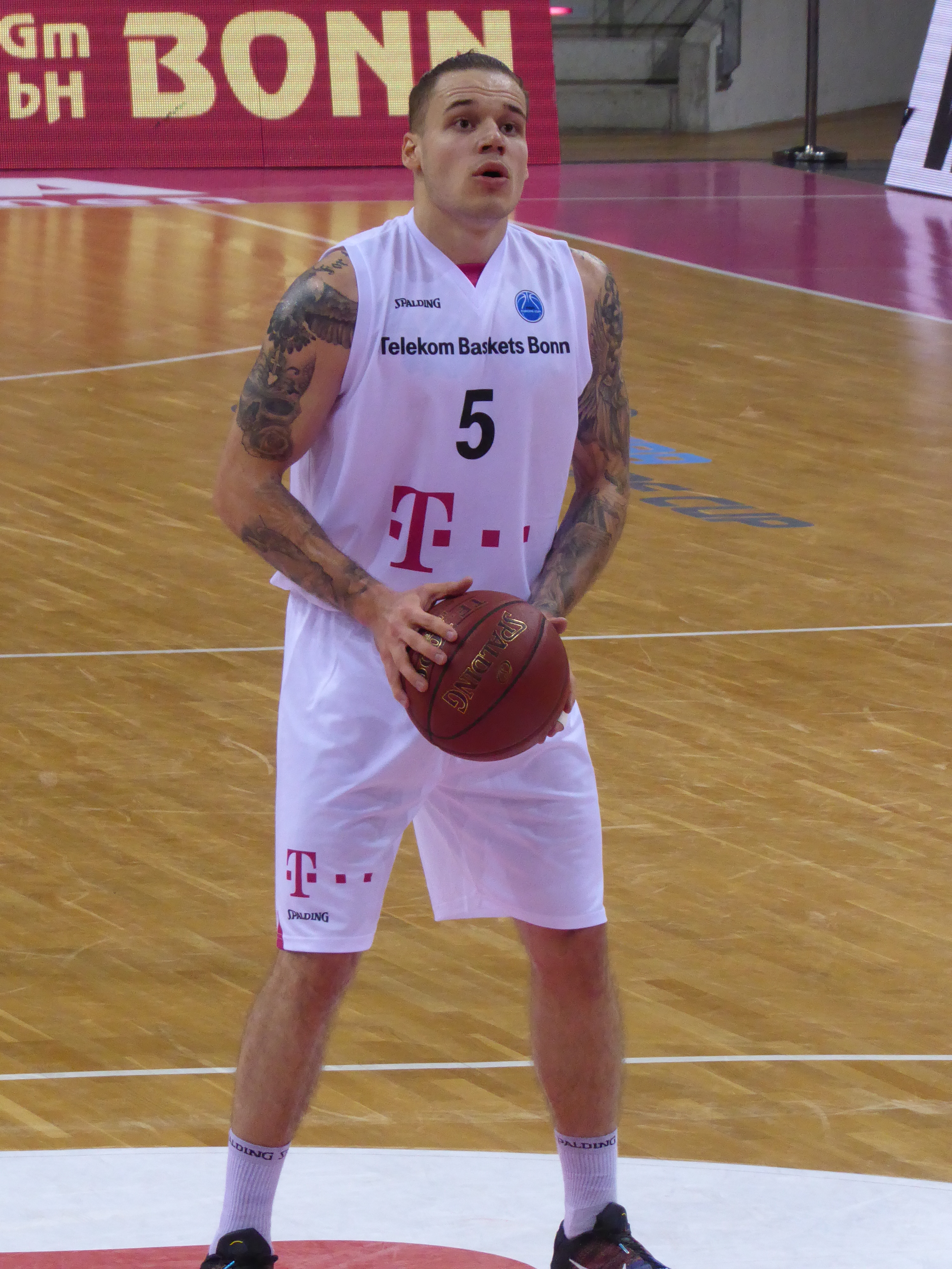 Konstantin Klein beim Spiel der Telekom Baskets Bonn gegen die Södertälje Kings am 25. Oktober 2016.